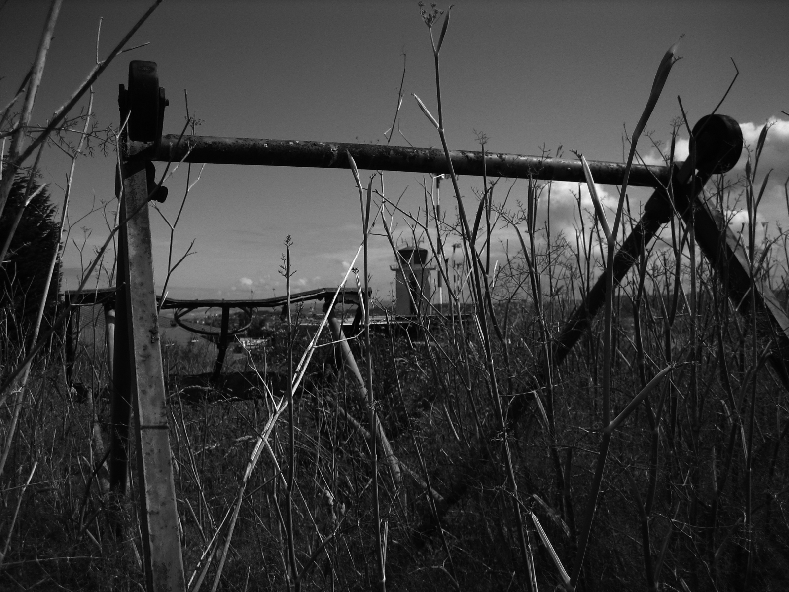 Instalacións abandonas do Antigo Aeroclub de Alvedro, Almeiras, Culleredo.